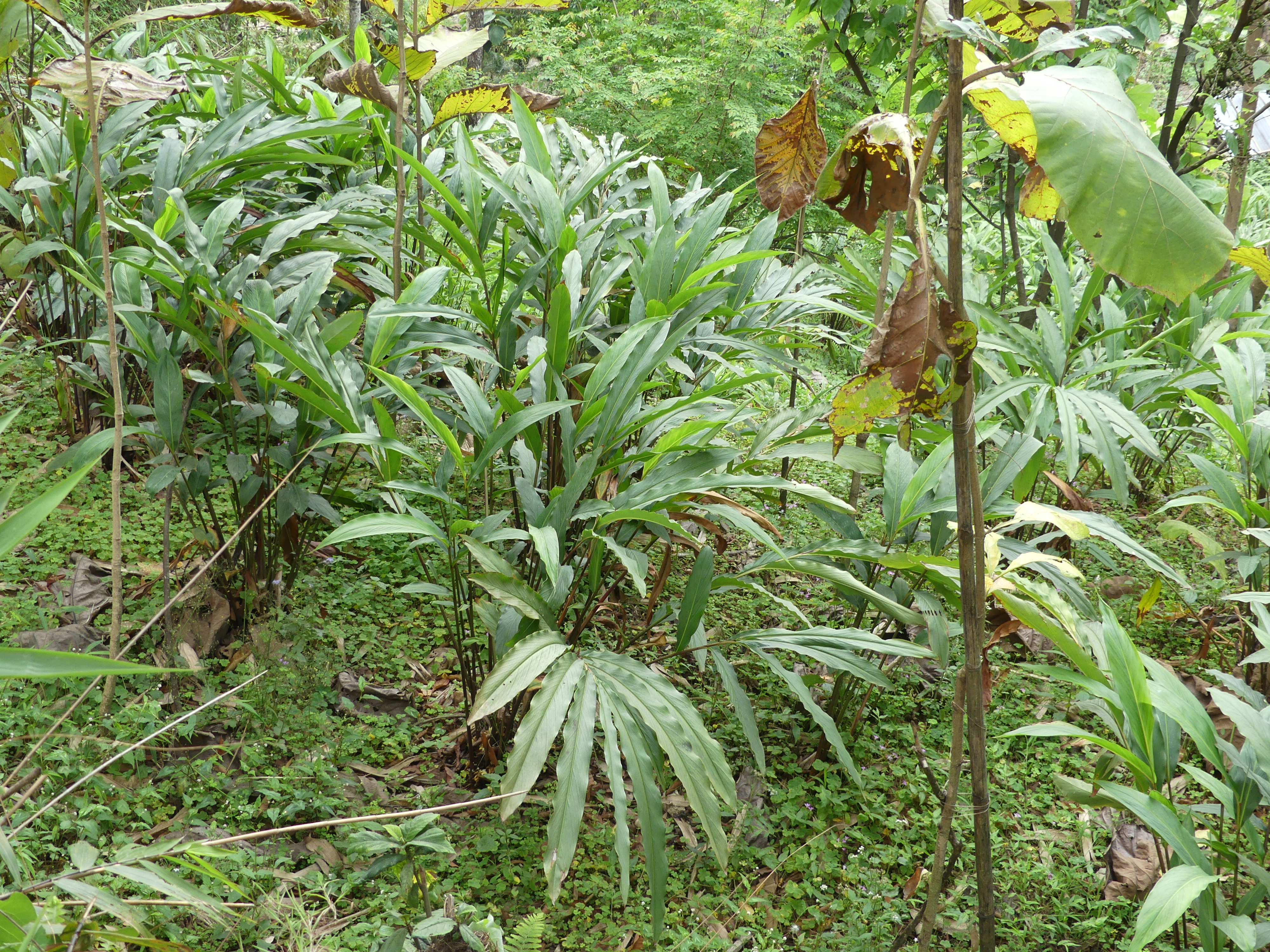 Amomum subulatum in north Bengal